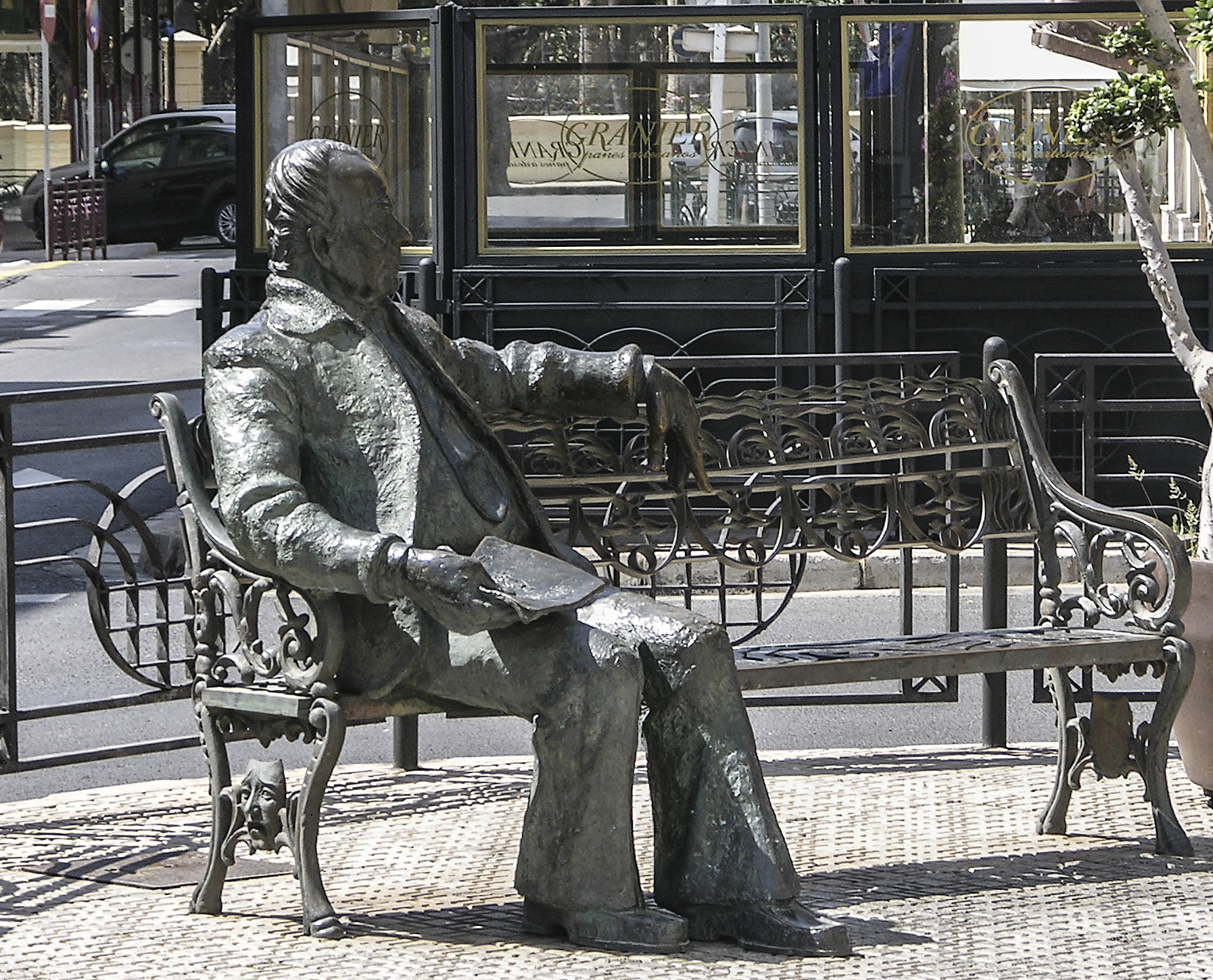 Monumento a Antonio César Jiménez, en Calle Chacel (Melilla). Obra del escultor Mustafa Arruf.